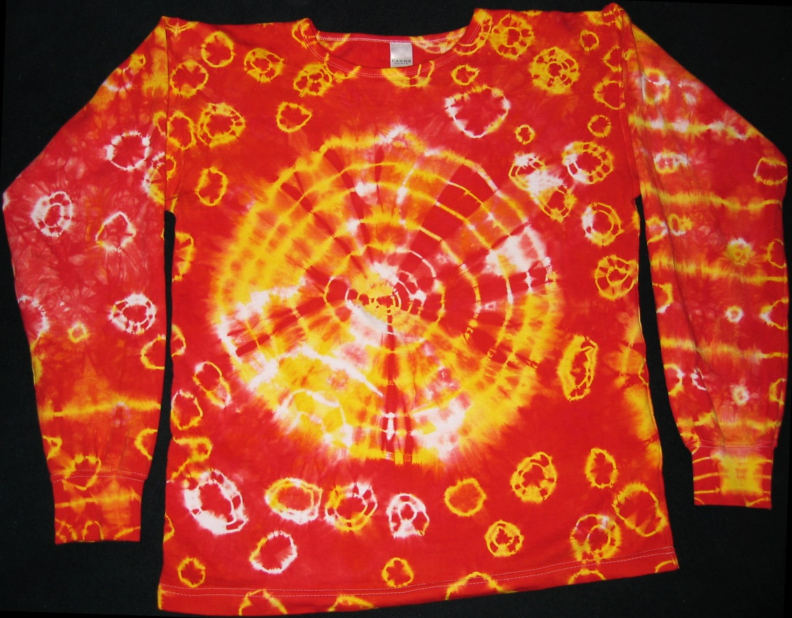 Bildbeschreibung: Batik Quelle: eigene Aufnahme Fotograf: selbst fotografiert von Johann H. Addicks Genehmigung: GFDL, kein wie auch immer geartetes "Gentlemen-Agreement". Bildnutzung ohne Einhaltung der Bestimmungen der GFDL ist kostenpflichtig und wird vom Rechteinhaber in Rechnung gestellt. Zweitlizensierung auf Anfrage. Es gelten die AGB. Datum